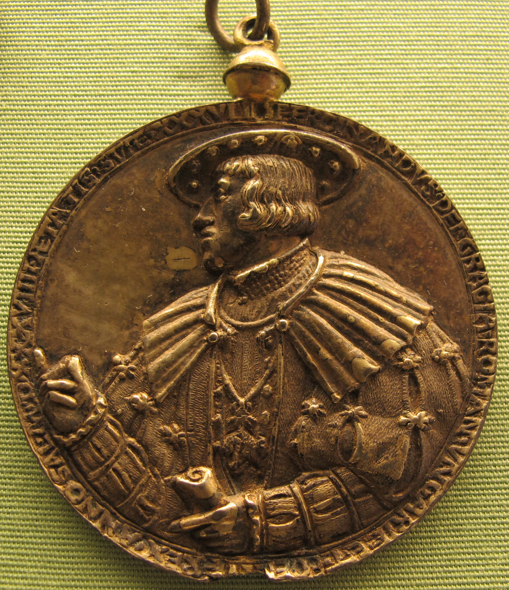 Ferdinando I, 1537